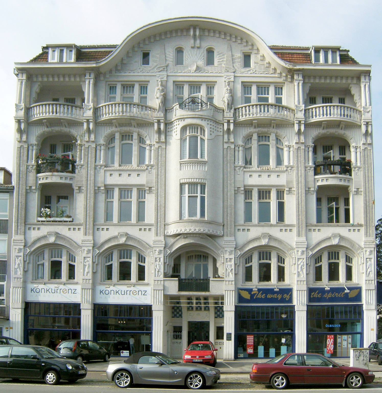 Bremer Automobil- und Fahrradcentrale in Bremen, Außer der Schleifmühle 27.Das abgebildete Objekt ist ein geschütztes Kulturdenkmal in der Freien Hansestadt Bremen, mit der Nr. 0054 beim Landesamt für Denkmalpflege registriert.